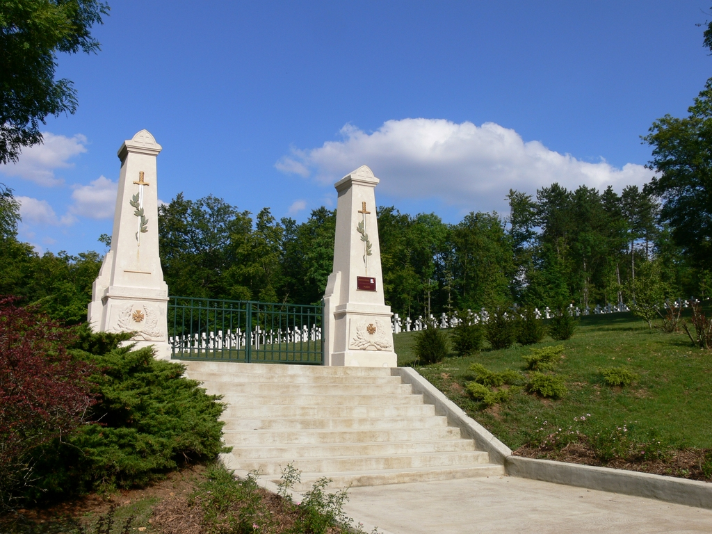 Nécropole nationale de Flirey, Lorraine, France. Première Guerre Mondiale